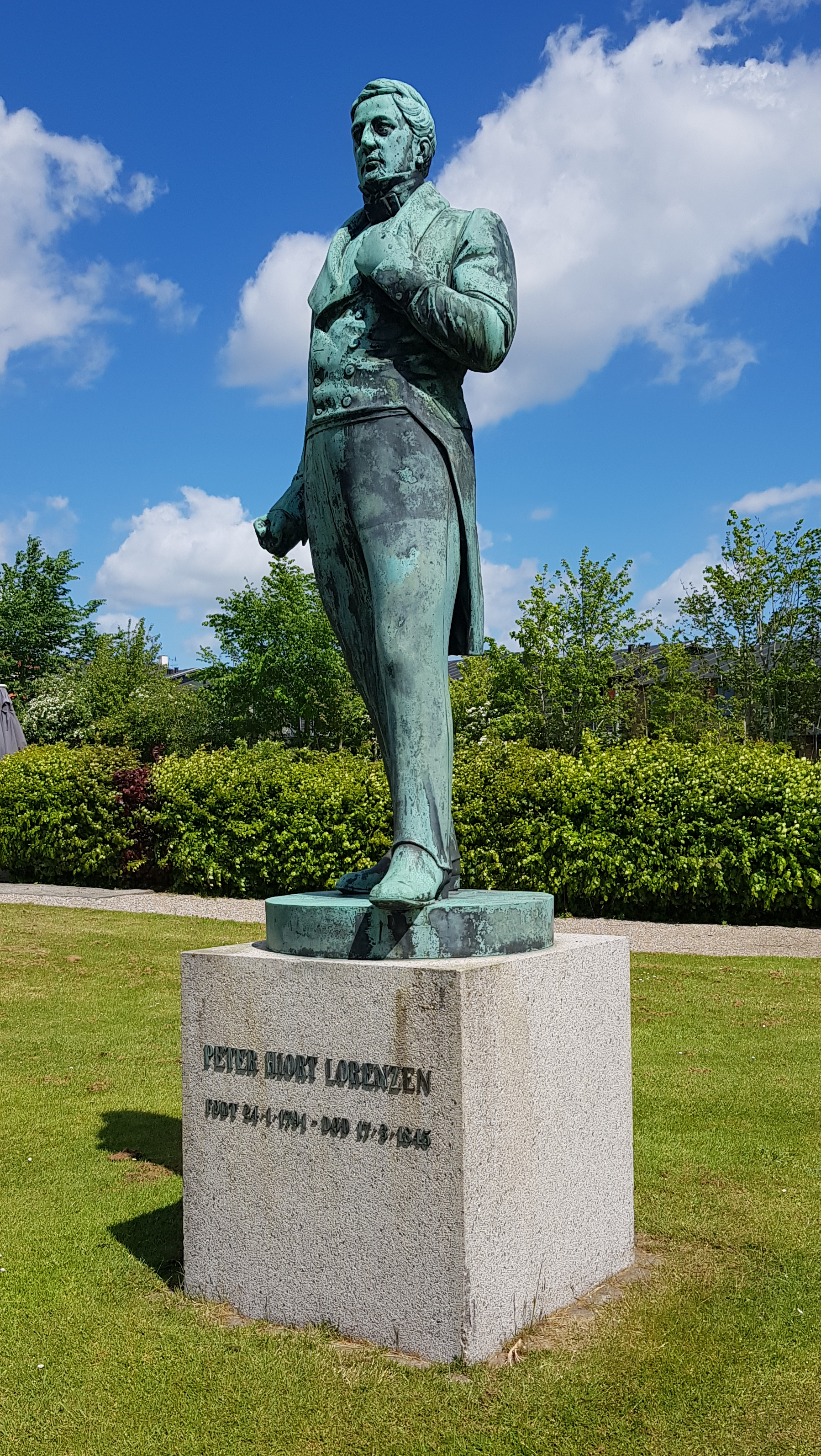 Statue ved Damparken i Haderslev udført i 1928 af Carl Mortensen